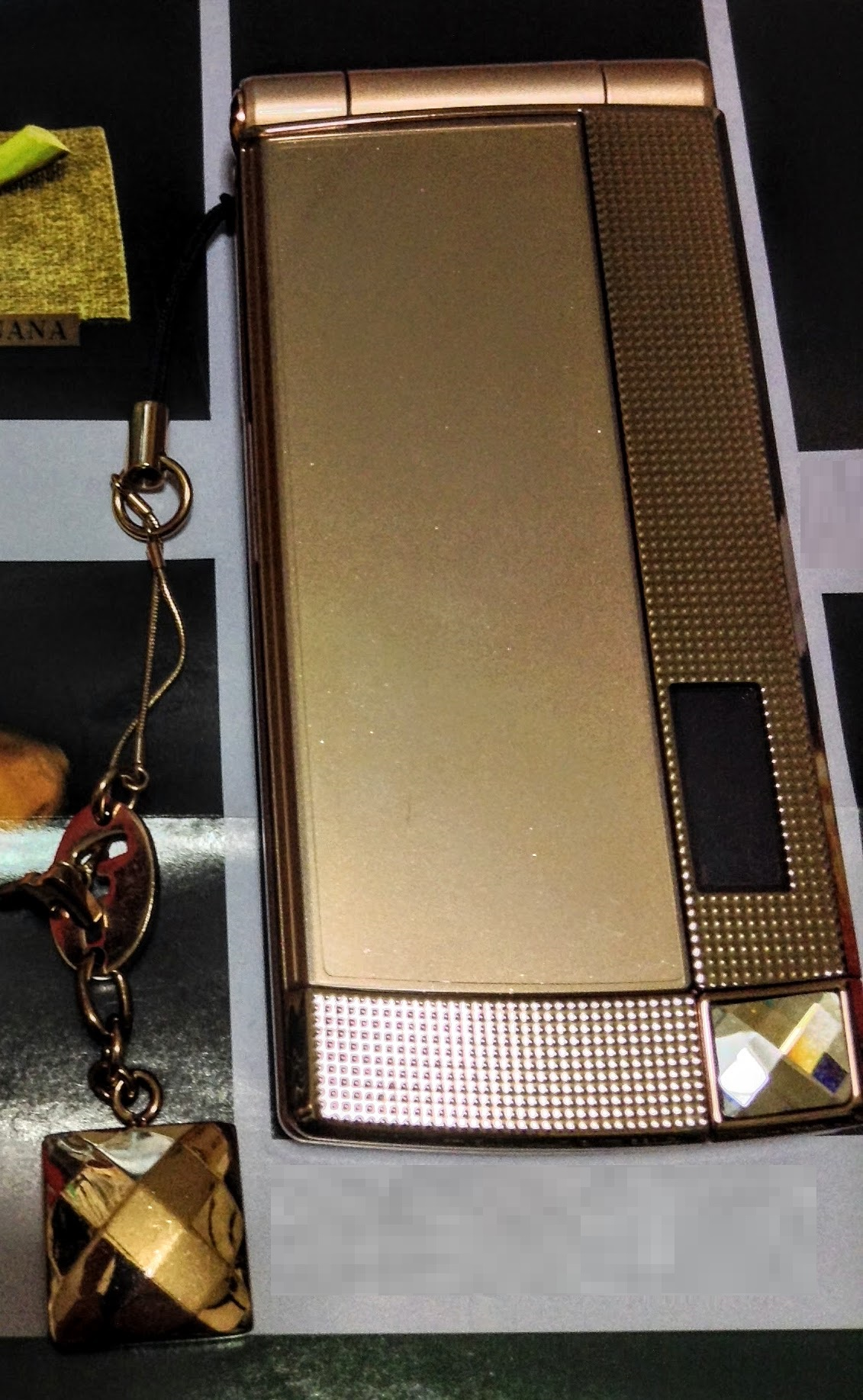 F-02Bのフォリフォリゴールドと付属品のフォリフォリキーホルダー